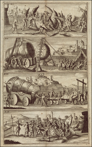 Mustaphato Salicio: "Neu und wundersame Erfindung Eines Küpfernen Mörsels, Welcher vermittels des Windes, so grosse Bomben wirfft, daß man darein 25. Mann verstecken und selbige ohne Schaden in eine feindliche Stadt oder Vestung werfen kan: auf die Probe gesetzet und erfunden, durch den Weltberuffenen Ingenieur Mustaphato Salicio, der Zeit Renegaten"